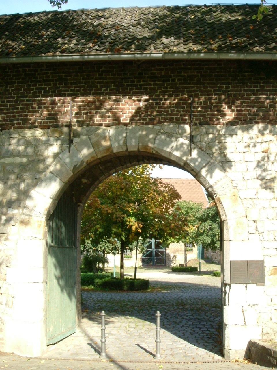 Gut Melaten - das ehemalige Siechenhaus und Leprastation vor den Toren der Stadt Aachen